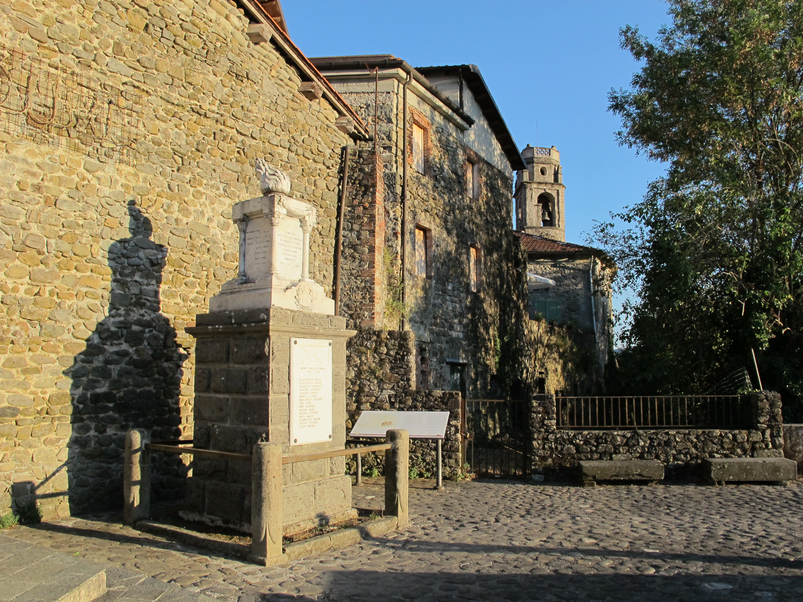 Filattiera, piazzetta con monumento ai caduti